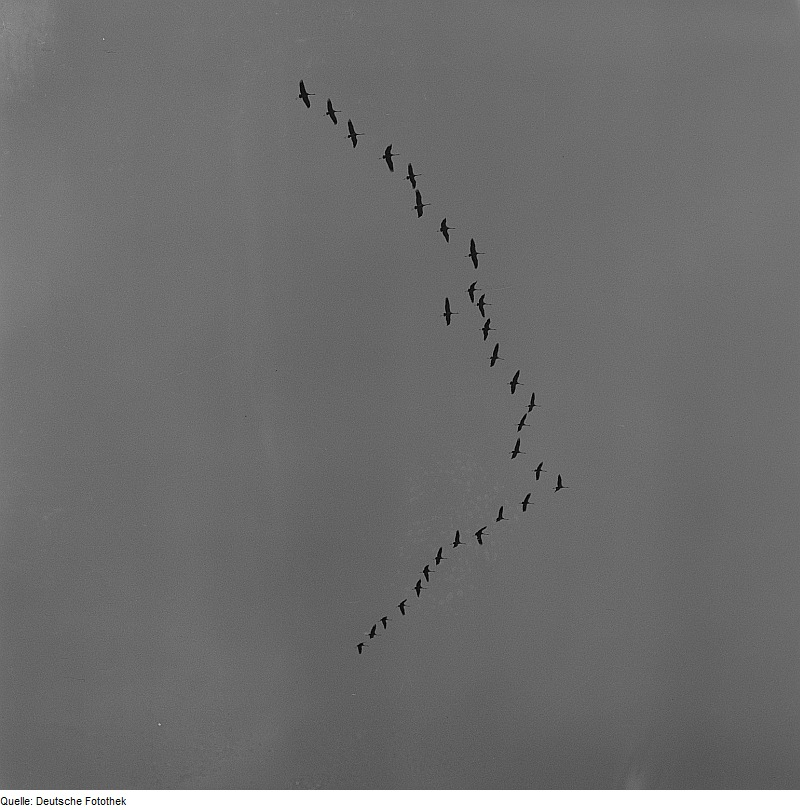 Original image description from the Deutsche Fotothek nach Nordwesten oder im Nordwesten von Rügen